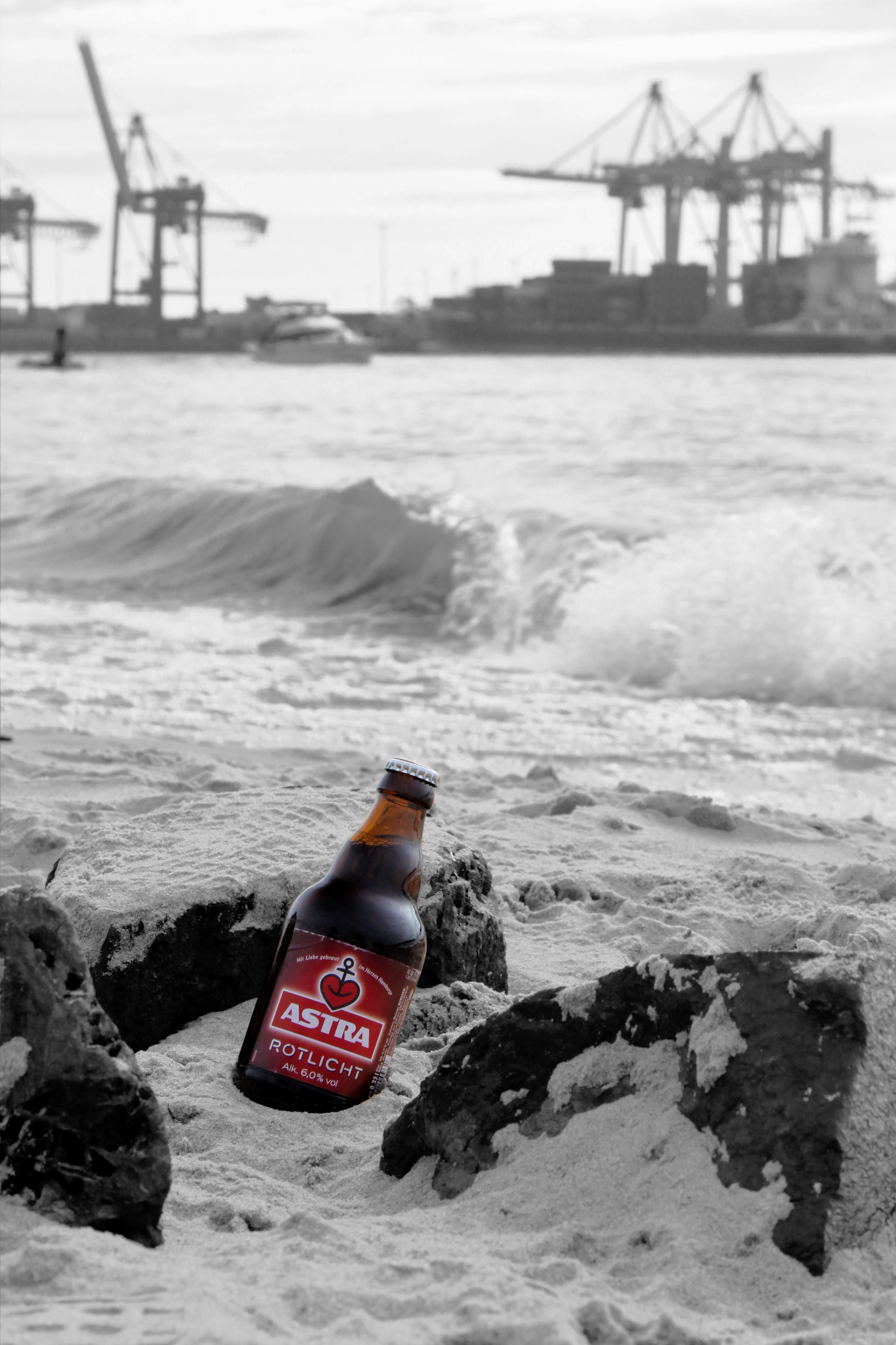 0,33l Flasche Steinieform Astra Rotlicht mit Hamburger Hafen im Hintergrund